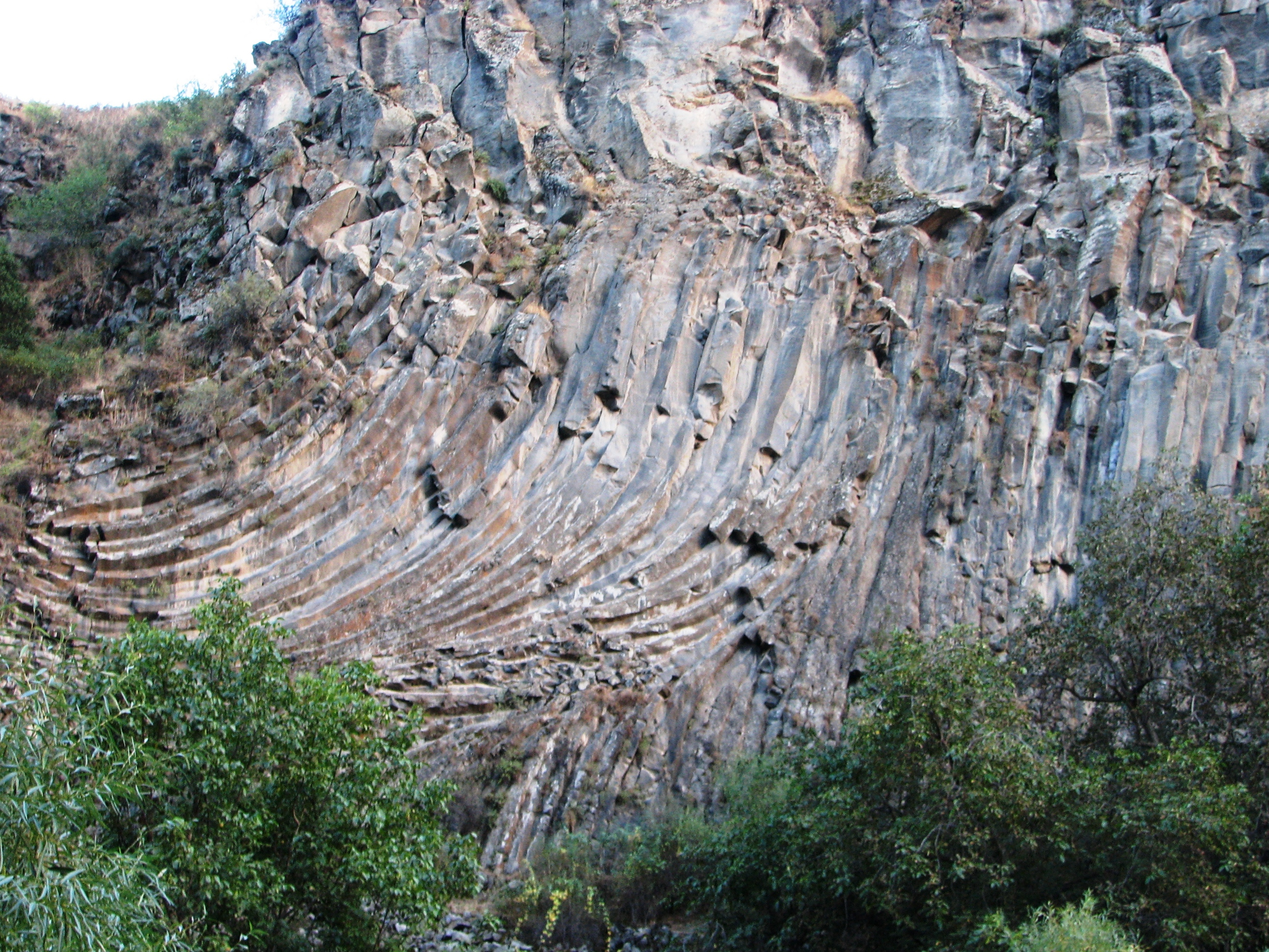 Garni Gorge is situated 23 km east of Yerevan, Armenia קניון גרני נמצא מזרחית לירוואן בירת ארמניה. התופעה המייחדת את הקניון הם עמודי בזלת בצורת משושים